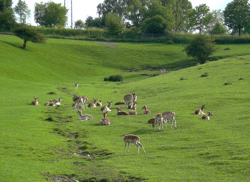 Wildgehege (Damwild) in der Kernstadt Schmallenberg, Germany.